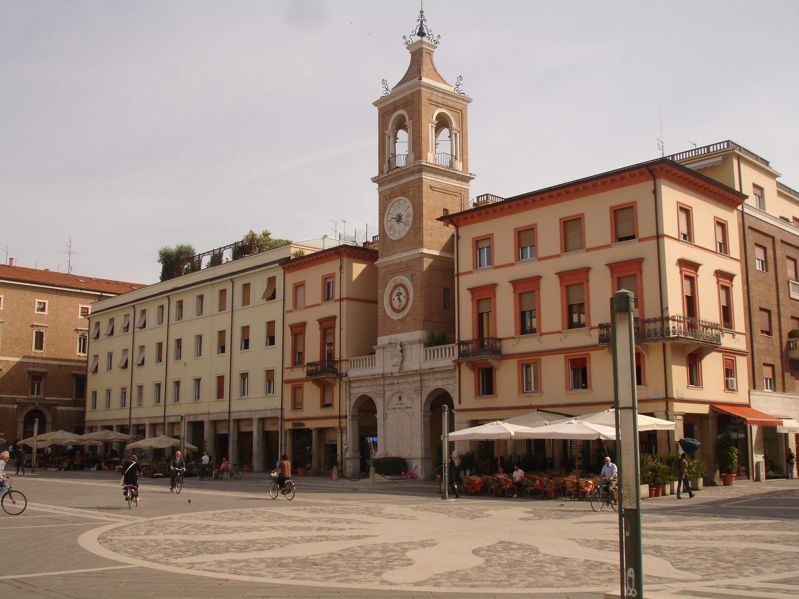 Scorcio di piazza Tre Martiri, a Rimini.